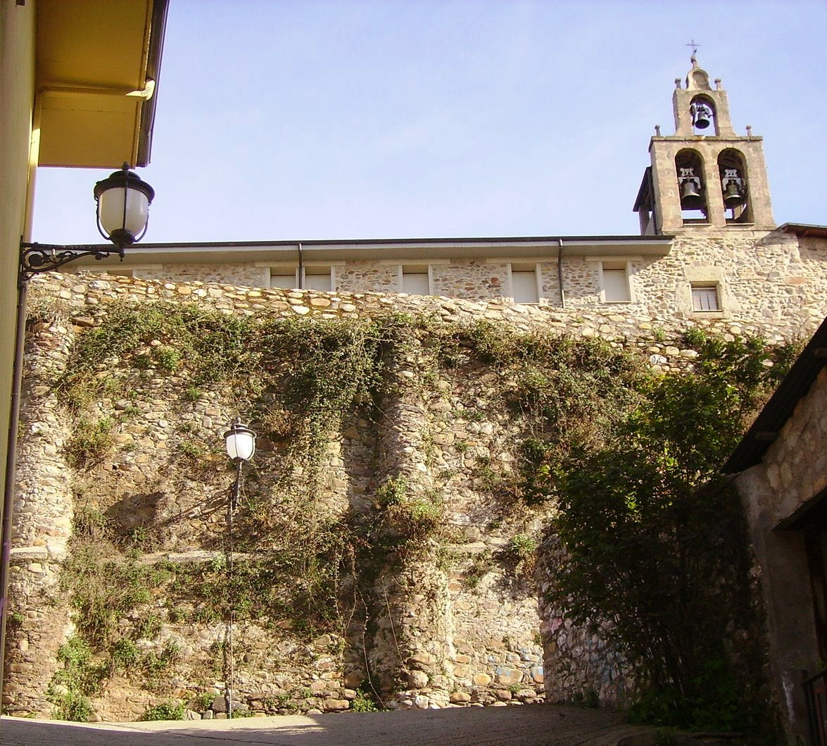 Lienzo de la muralla de la ciudad de Ponferrada (El Bierzo)